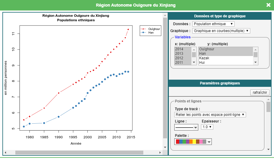 Makan Map graphique